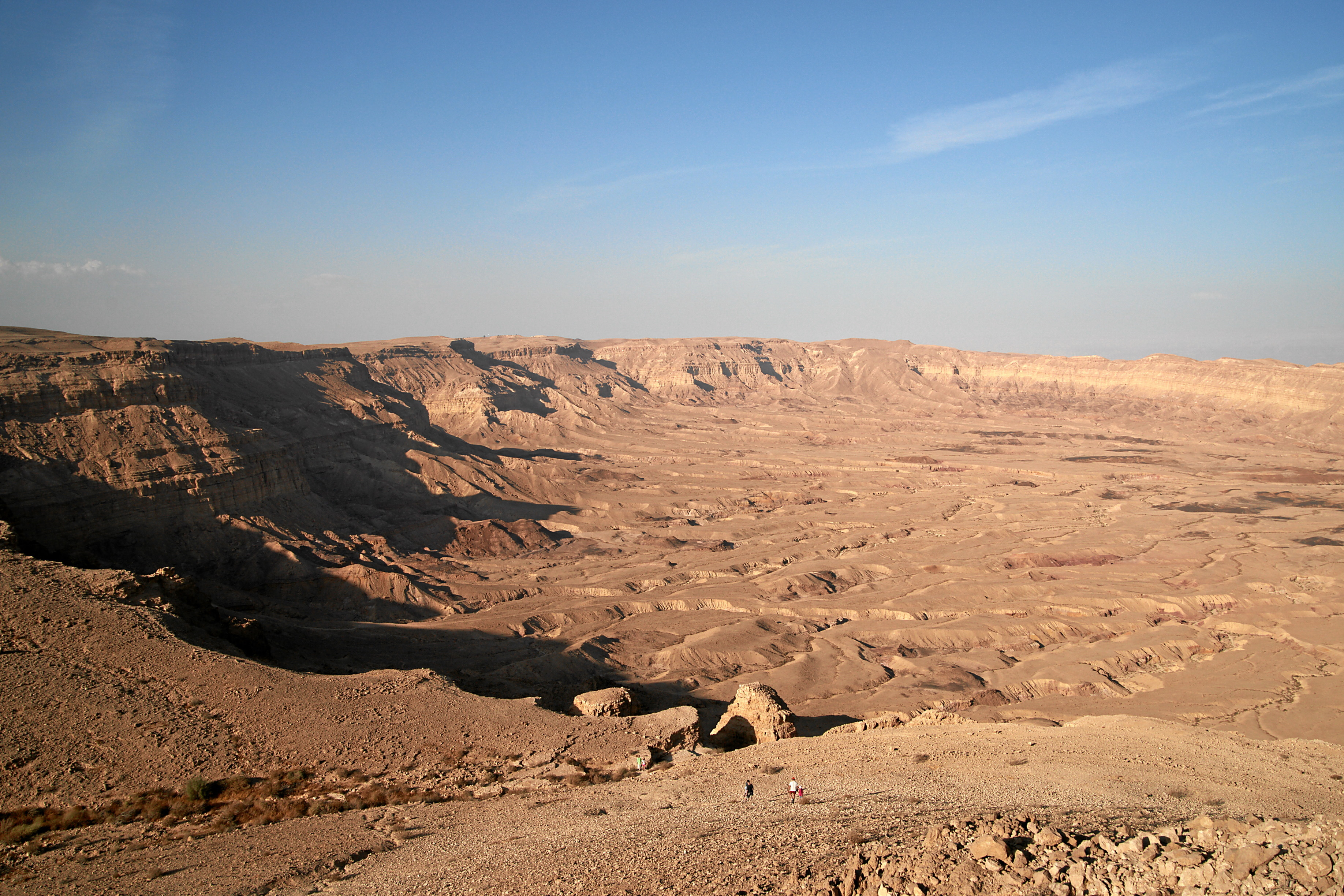 Makhtesh Katan: Blick vom Lookout